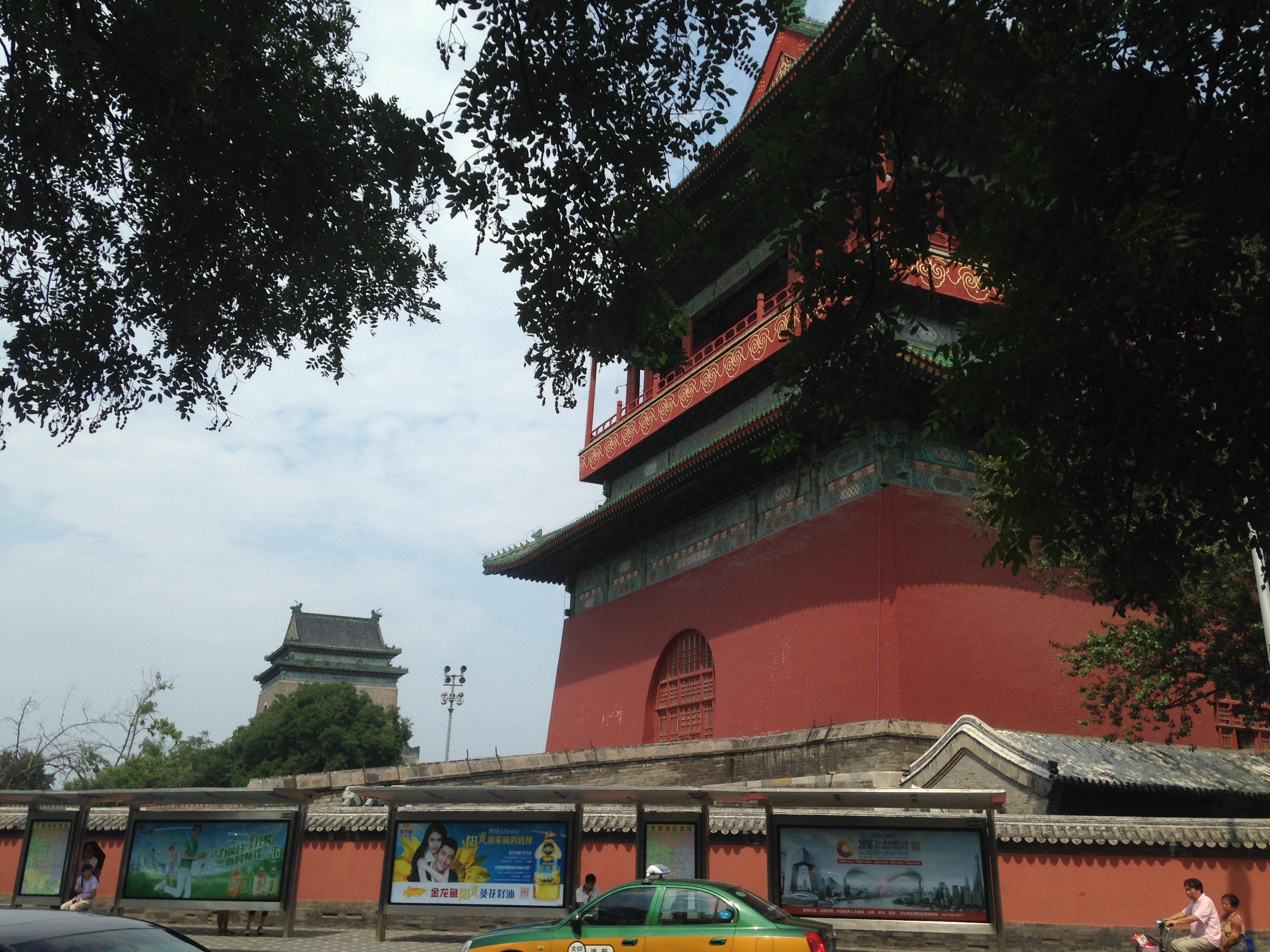 南側より望む北京鼓楼と鐘楼